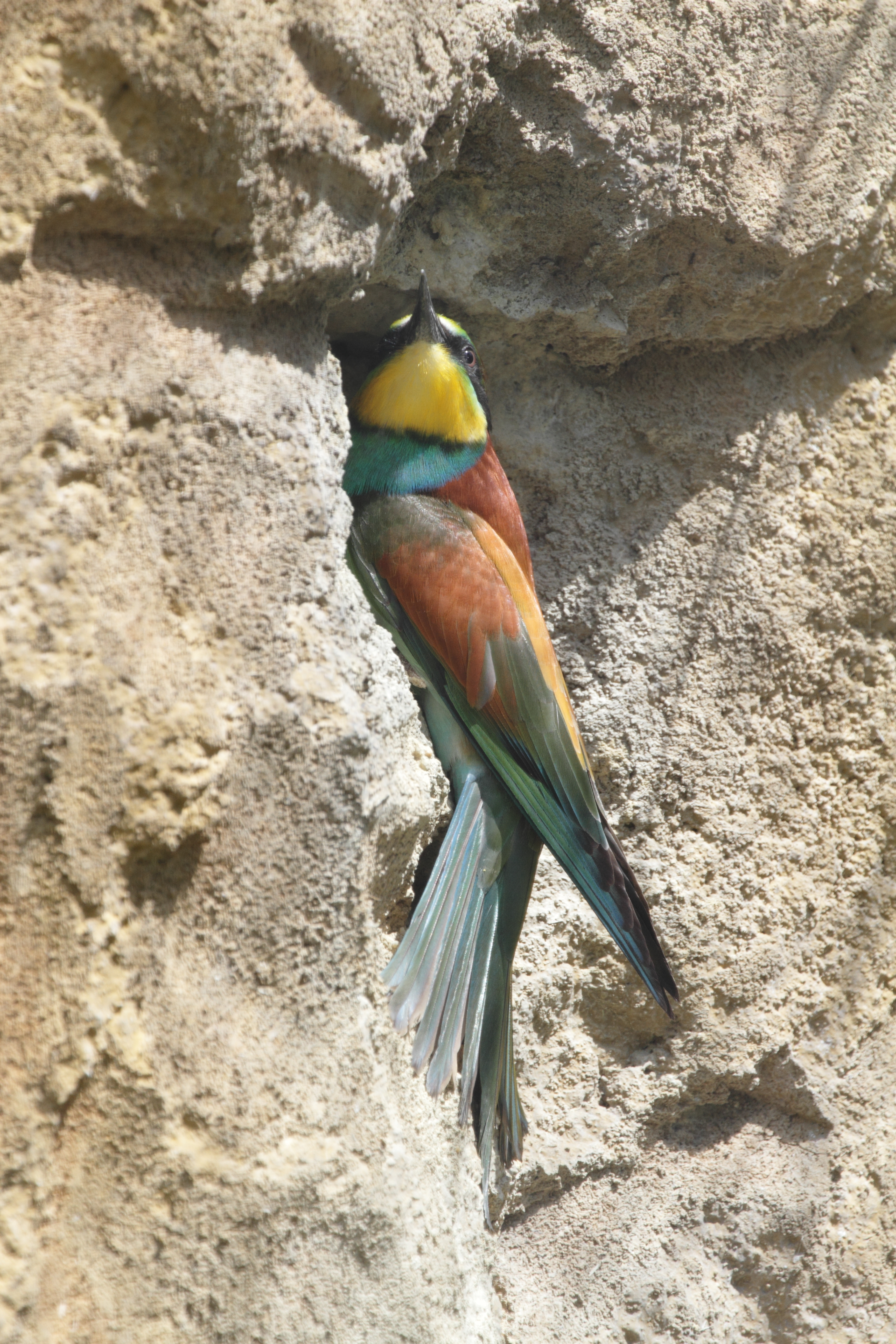 Bienenfresser im Tiergarten Schönbrunn.